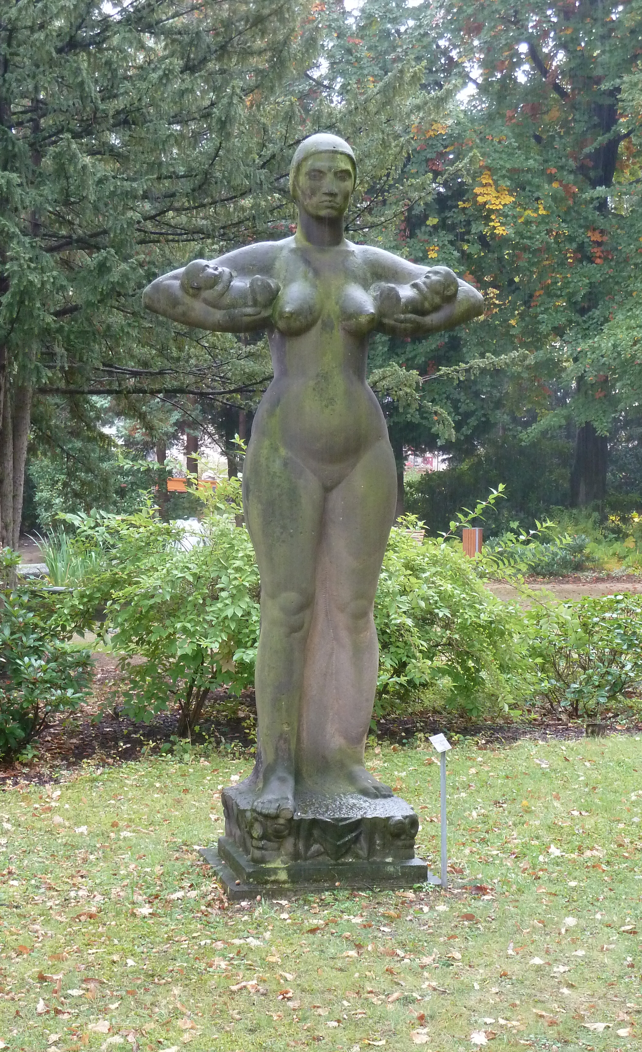 Ludwig Godenschweg: Mutter mit Kindern, um 1920 geschaffene Sandstein-Skulptur. Sie befindet sich heute im Herrengarten auf dem Gelände des Universitätsklinikums Carl Gustav Carus Dresden.